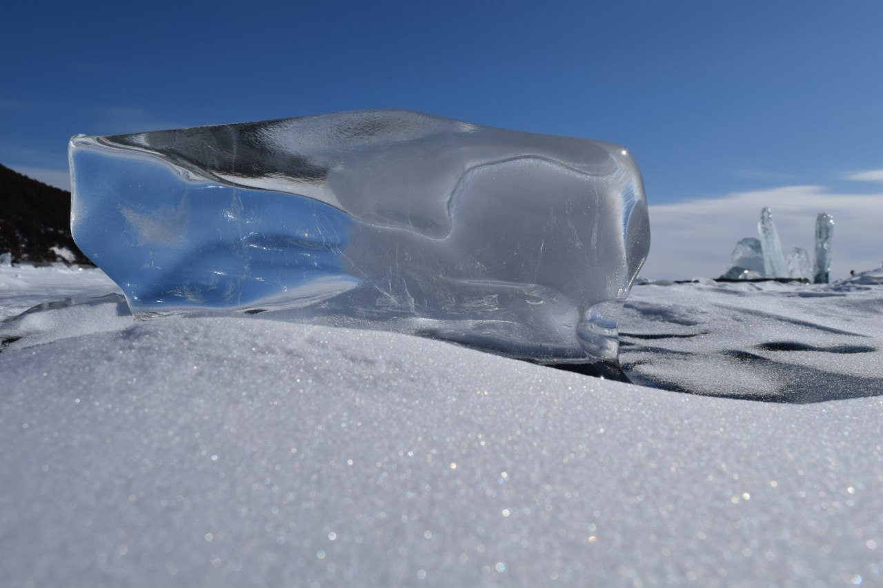 Листвянка, Иркутский район This image is related to the protected area of Russia number 3810100